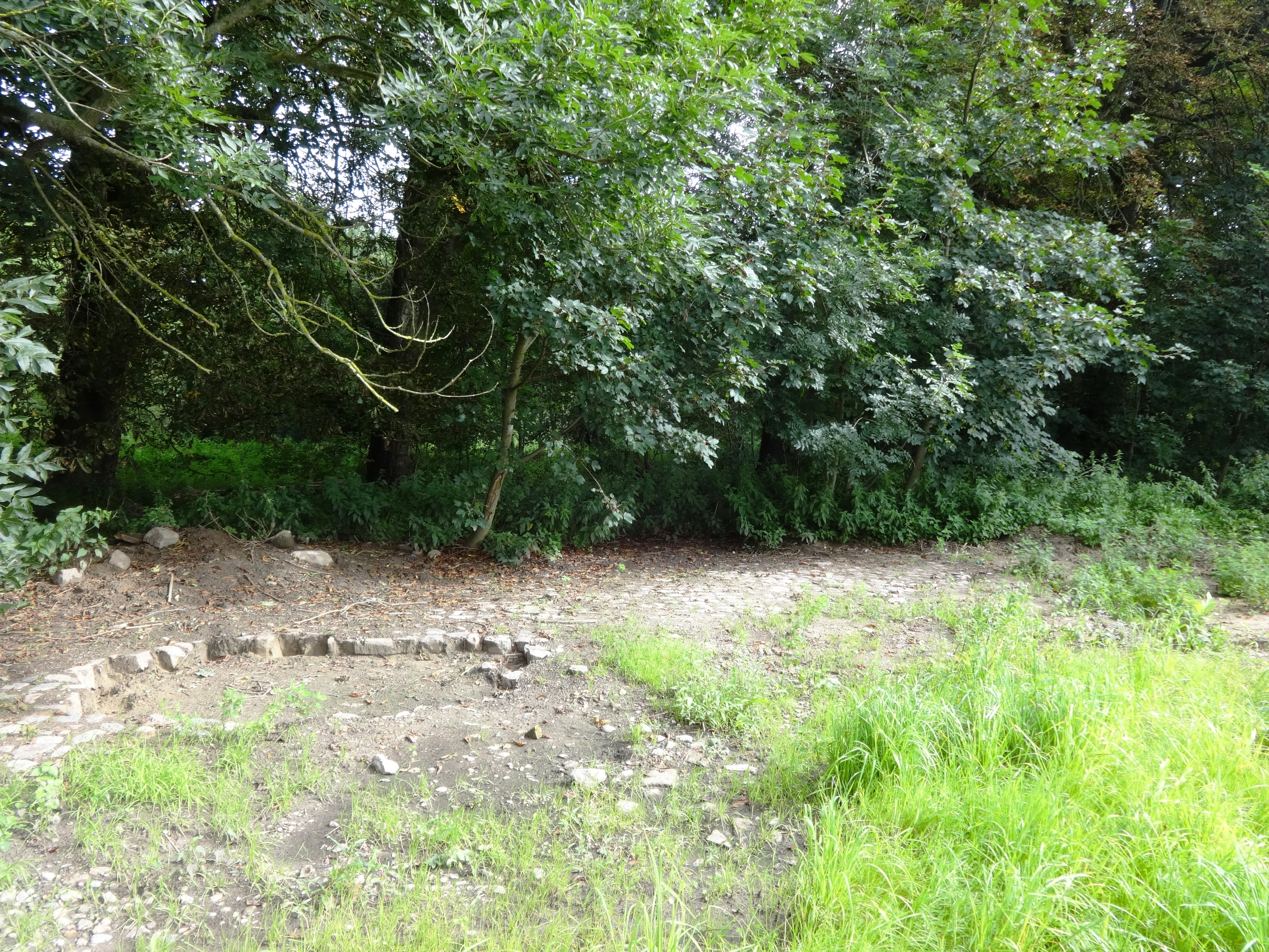 Spiegelsdorf, eine nach 1920 entstandene, moderne Wüstung in Neu Boltenhagen, einer Gemeinde im Landkreis Vorpommern-Greifswald in Mecklenburg-Vorpommern